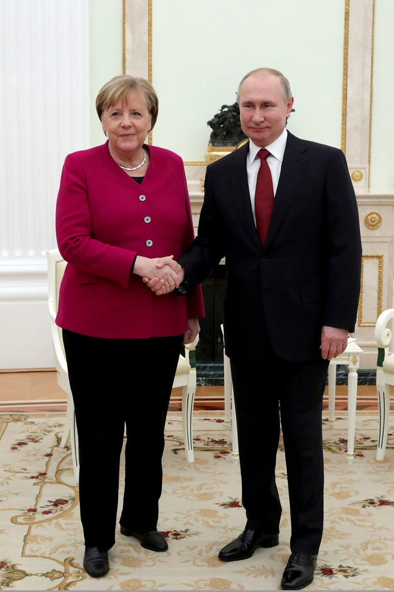 Президент Российской Федерации Владимир Путин с Федеральным канцлером Германии Ангелой Меркель.